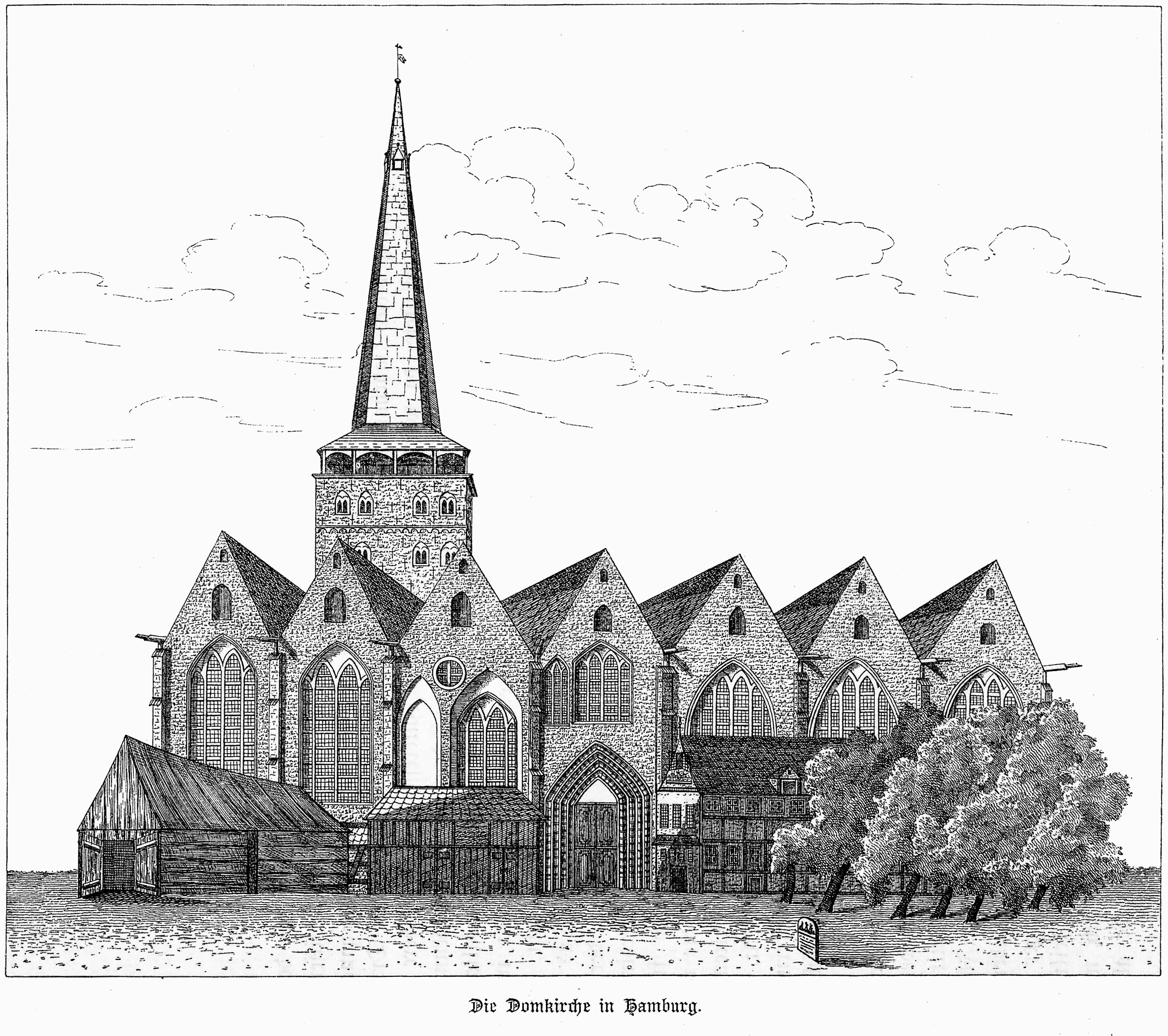 Mariendom, Hamburg